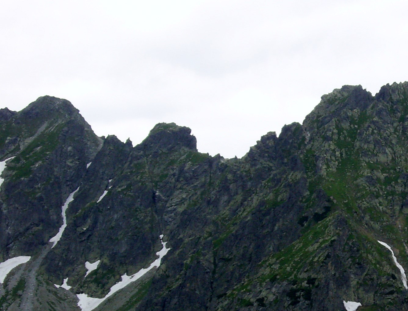 Skrajny Granat, Orle Turniczki i Orla Baszta ze szlaku przez Świstówkę Roztocką